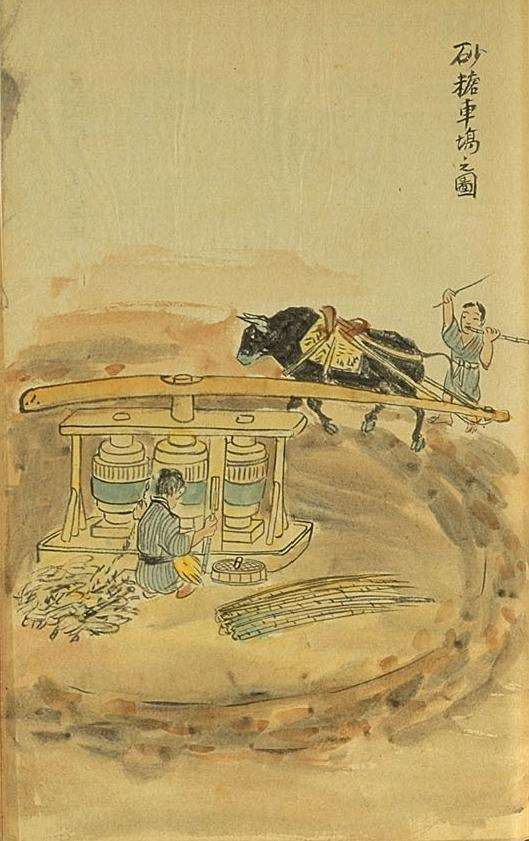 《德之島事情》插圖